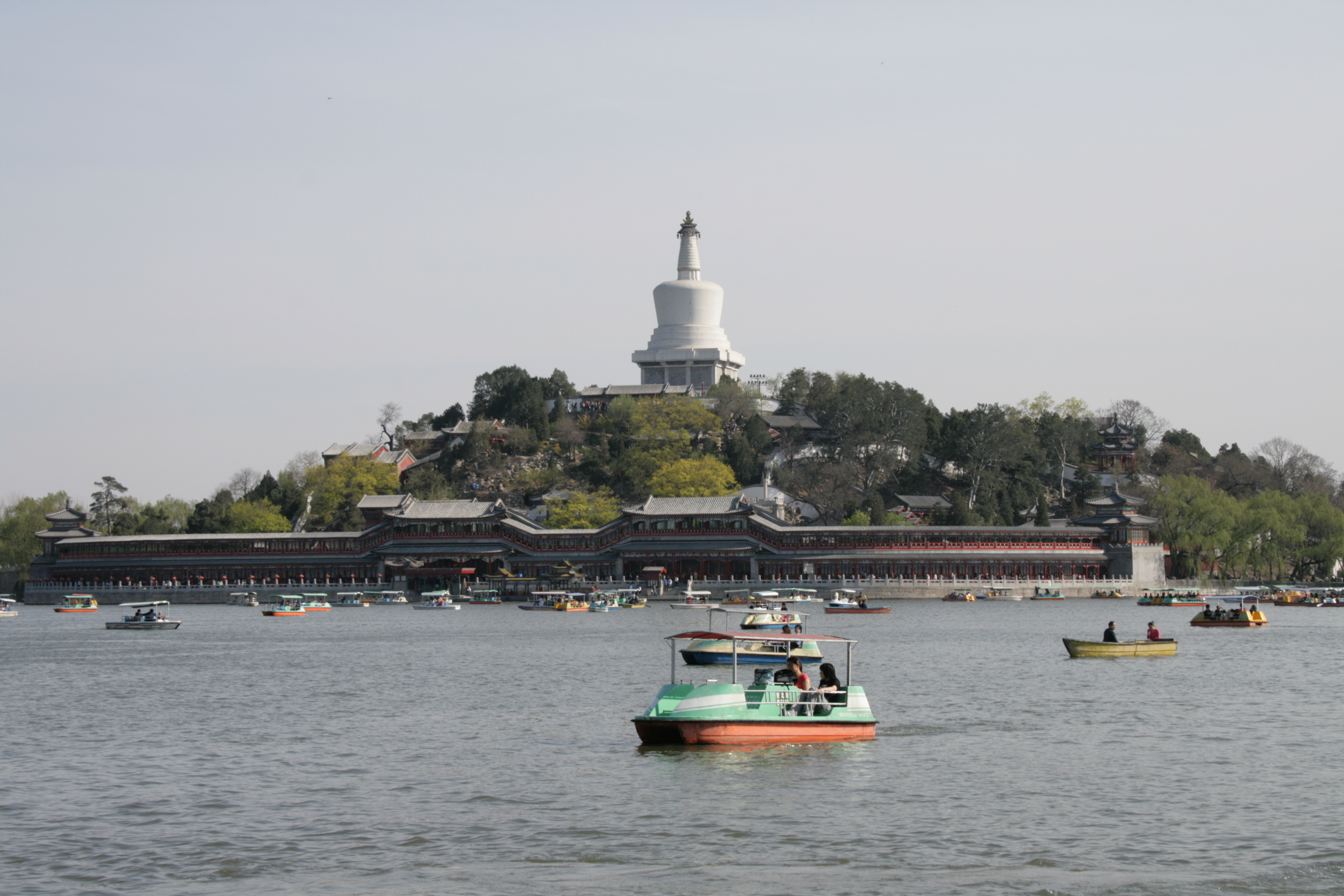 Bei-Hai Park, China.